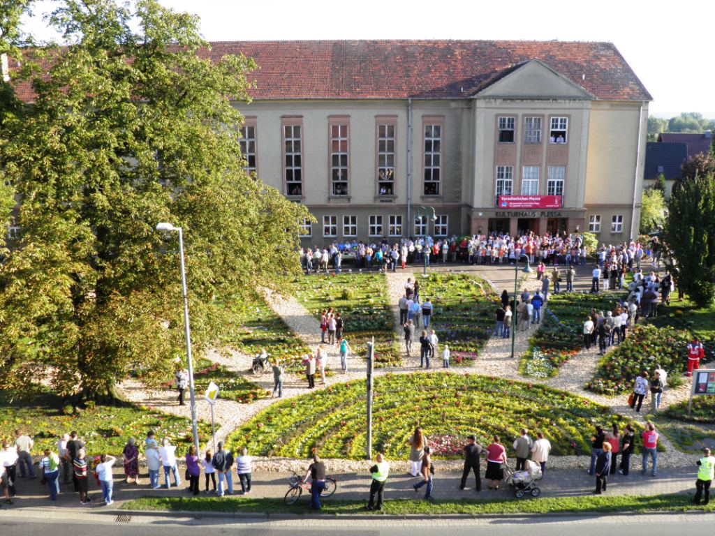 Kulturhaus Plessa, Platz des Friedens 1, 04928 Plessa.